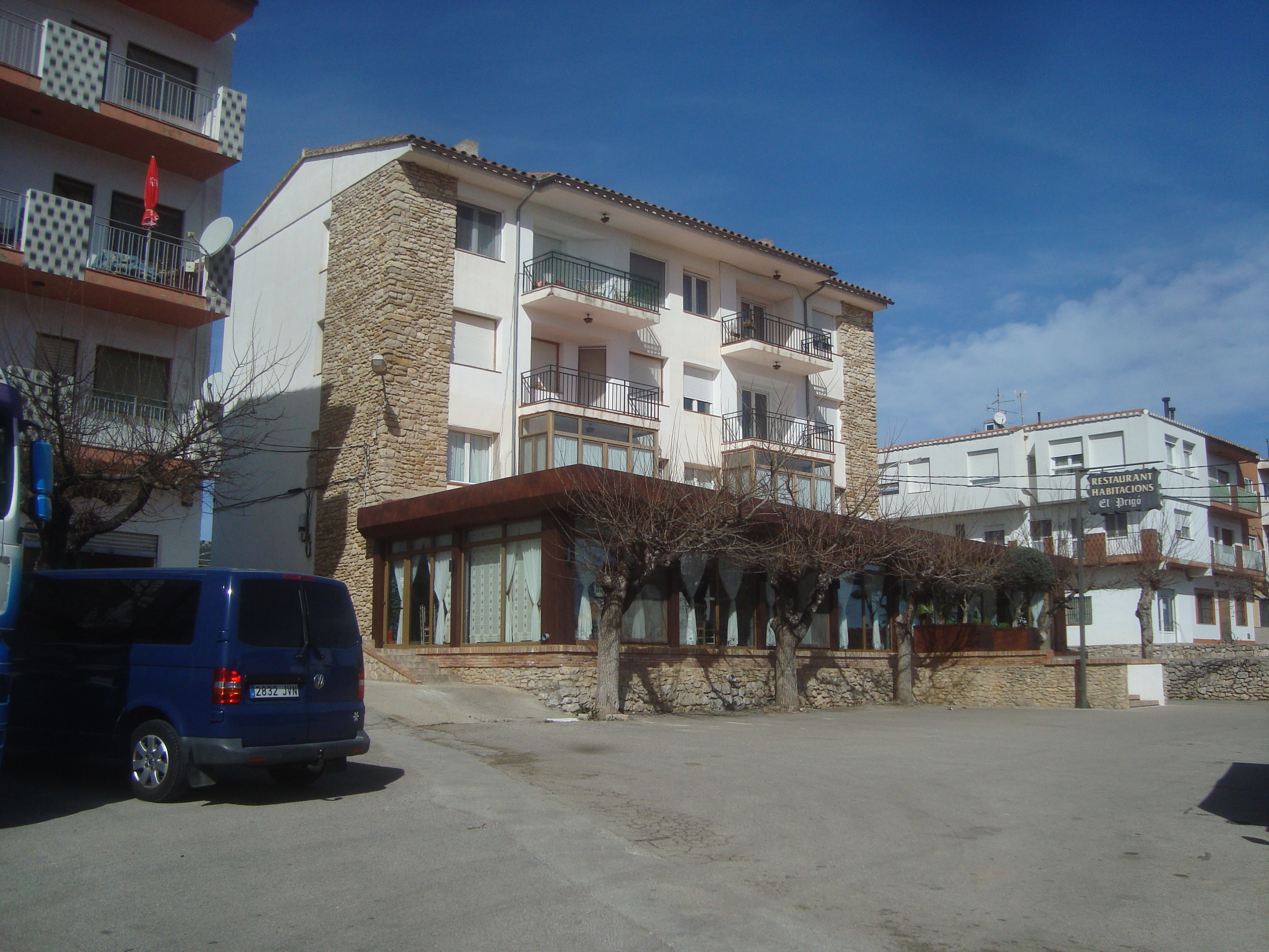 Catí (Castellón).